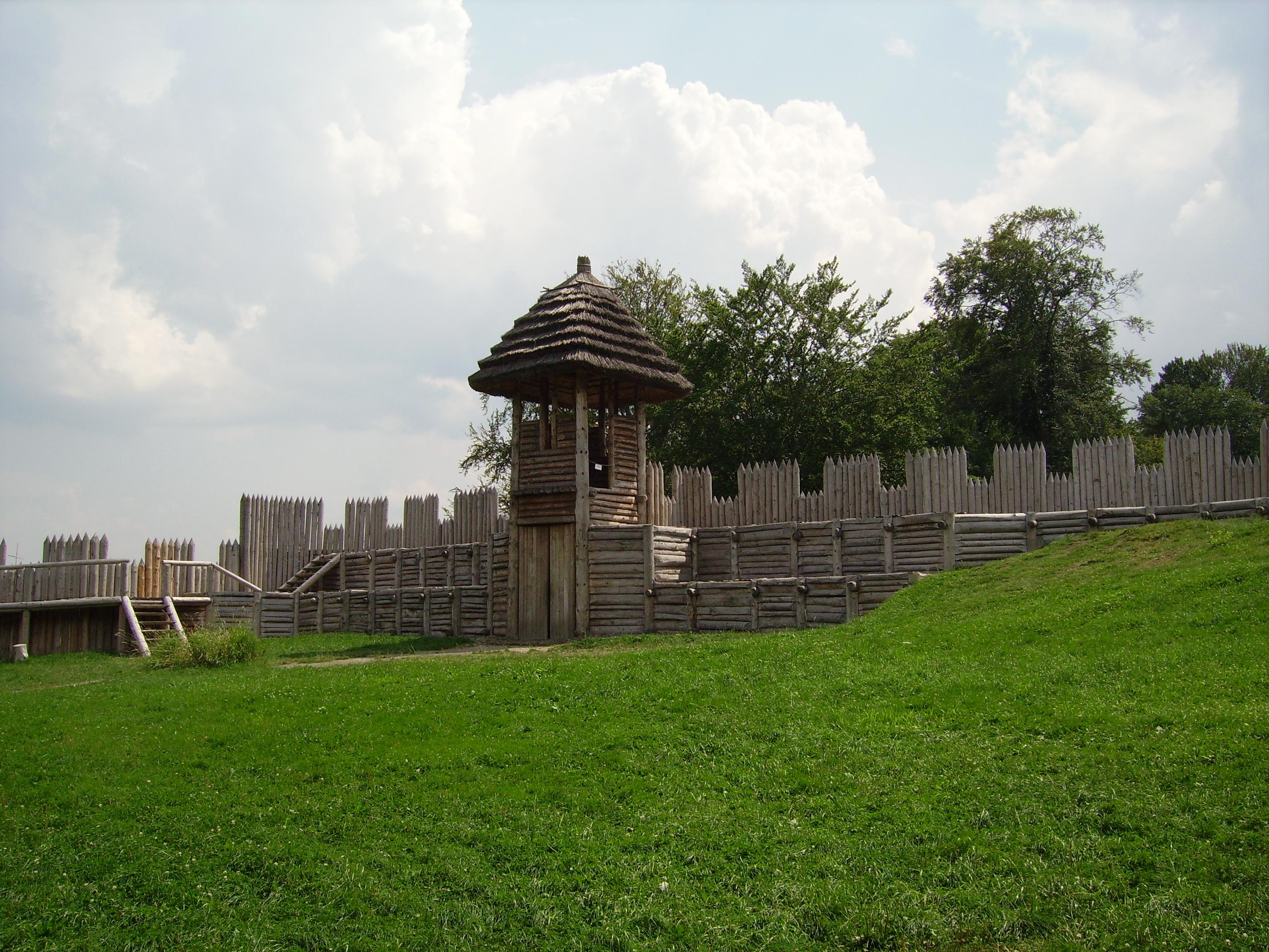 Archeopark Chotěbuz-Podobora (Cz)